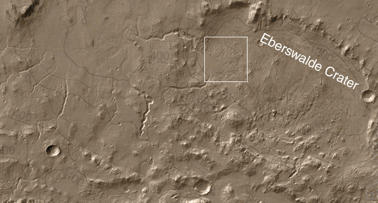 Снимок из космоса кратера Эберсвальде и впадающей в него реки (высохшее русло), Марс. Снимок расчерчен изобарами.